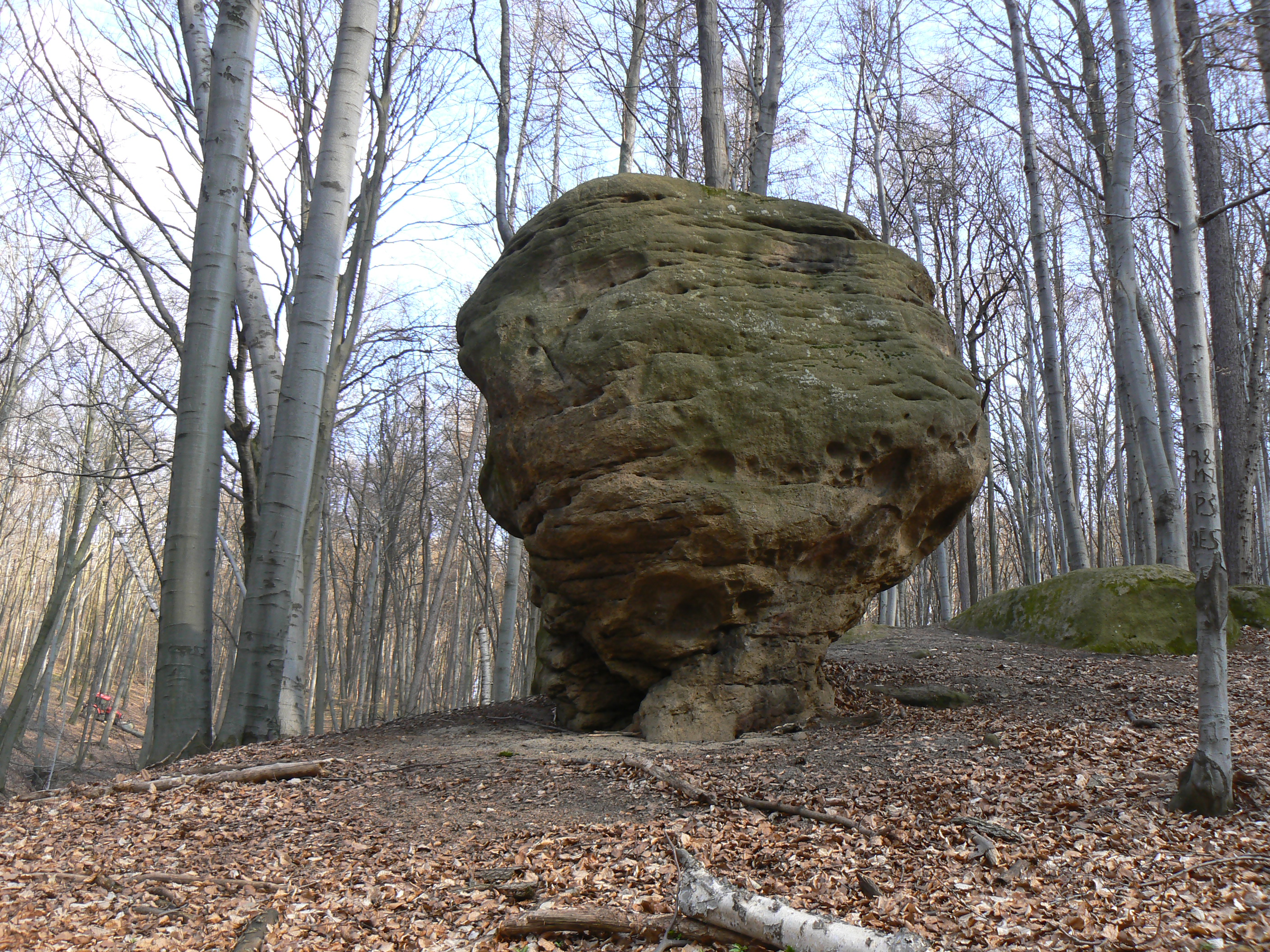 Skalní útvar Kalíšek v Chřibech